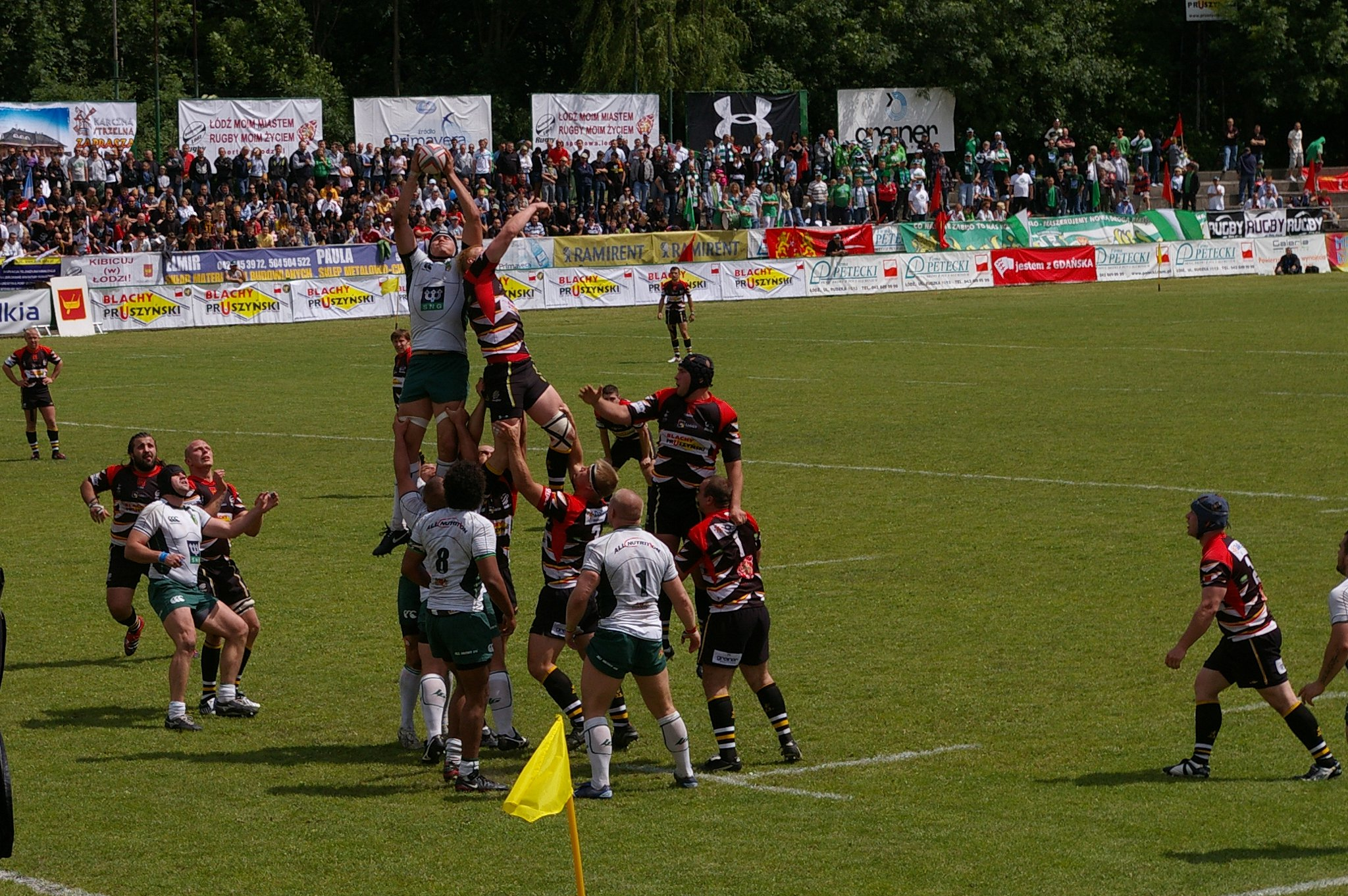 Finałowy mecz ekstraligi rugby sezonu 2009/2010 pomiędzy Budowlanymi Łódź a Lechią Gdańsk, aut Personality rights warning Although this work is freely licensed or in the public domain, the person(s) shown may have rights that legally restrict certain re-uses unless those depicted consent to such uses. In these cases, a model release or other evidence of consent could protect you from infringement claims.